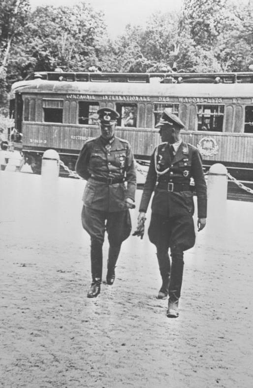 Compiègne, 21. Juni 1940. Keitel geht zur Konferenz.